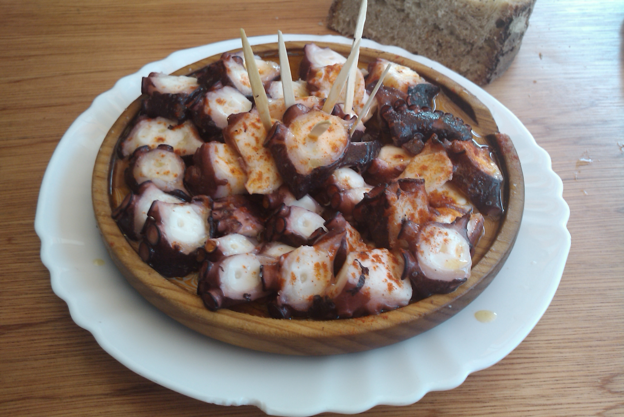 Polbo a Feira. Galiza